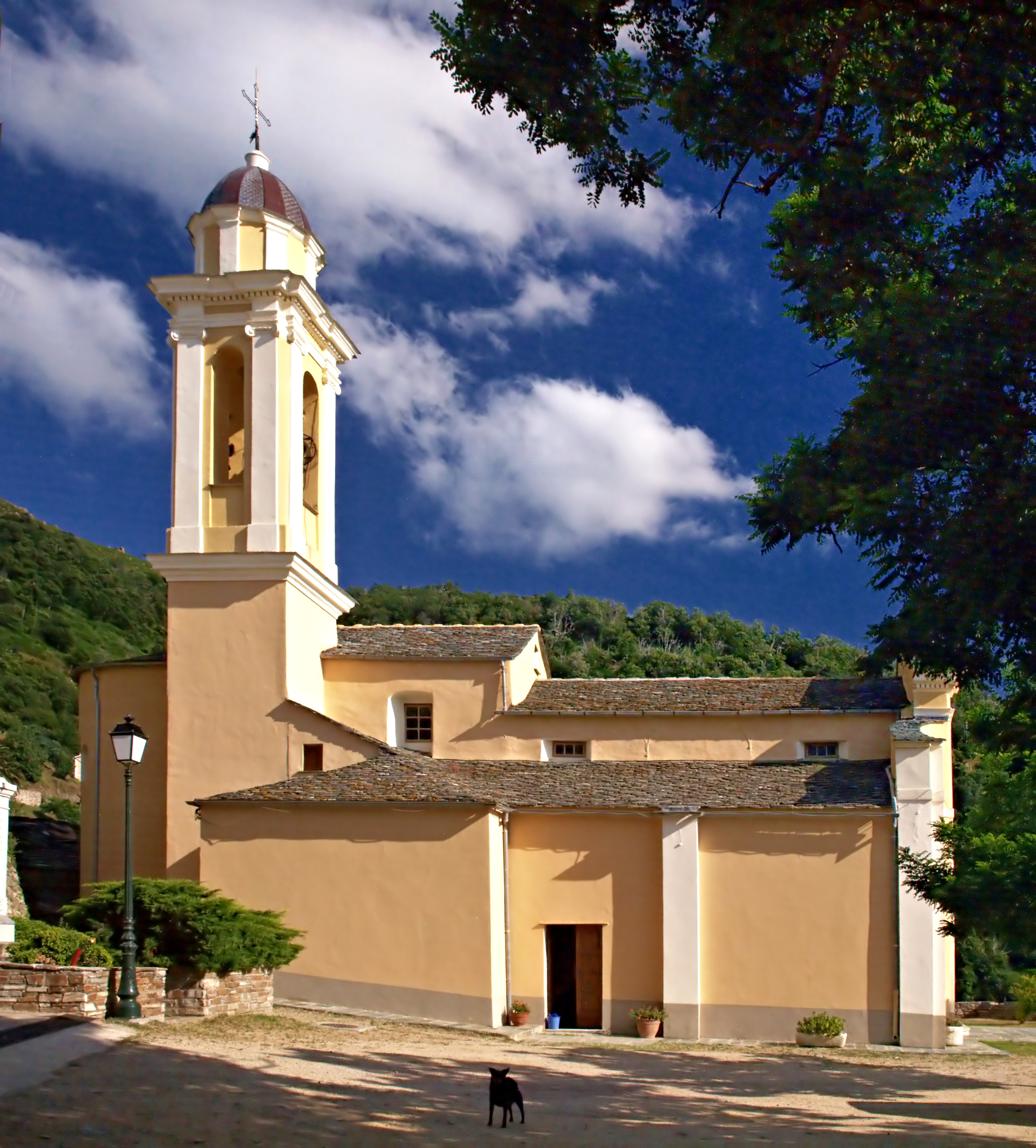 Poggio-d'Oletta, Nebbio (Corse) - Église San Cervone, façade nord